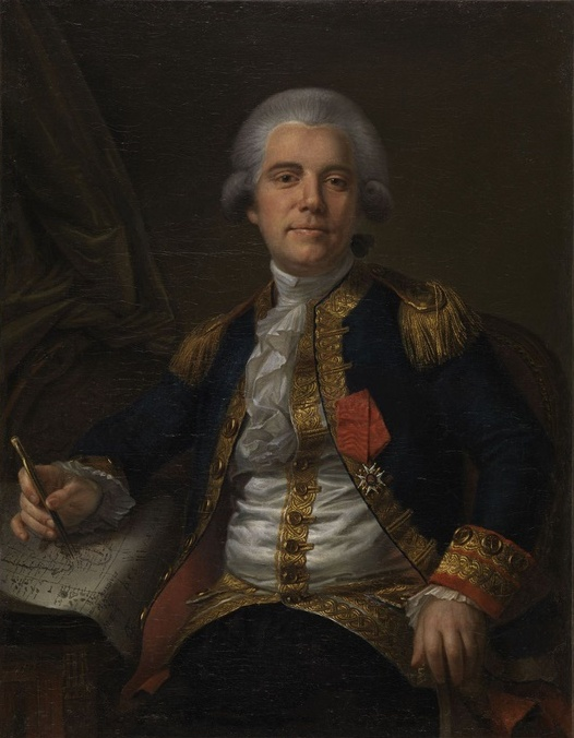 Portrait du capitaine de vaisseau Louis-Gaud de Ravennel (1747-1824). Peinture à l'huile (H. 92 cm, l. 72 cm, H. 113 cm, l. 94 cm (cadre). Musée de l'armée.